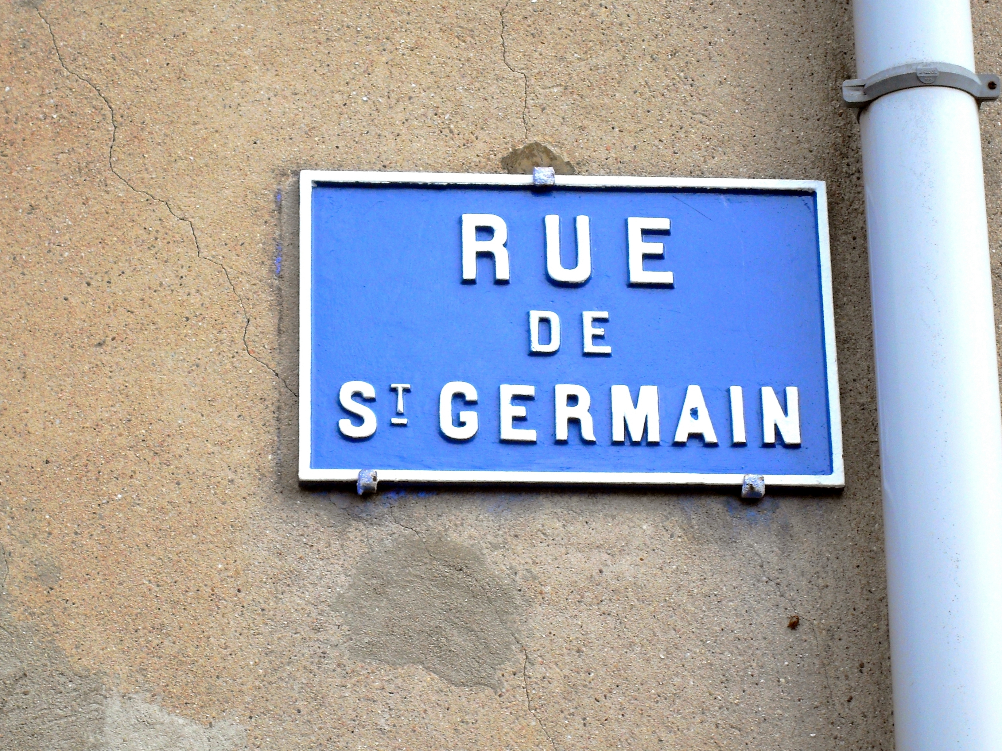 Foug Rue de Saint Germain plaque. La rue de Foug qui mène à la Savonnières s'appelle "rue de Saint-Germain", ce qui témoigne de l'existence passée d'une liaison directe entre les deux villages, via Savonnières, par la Voie romaine Reims-Metz. voir article détaillé : Voie romaine Reims-Metz.